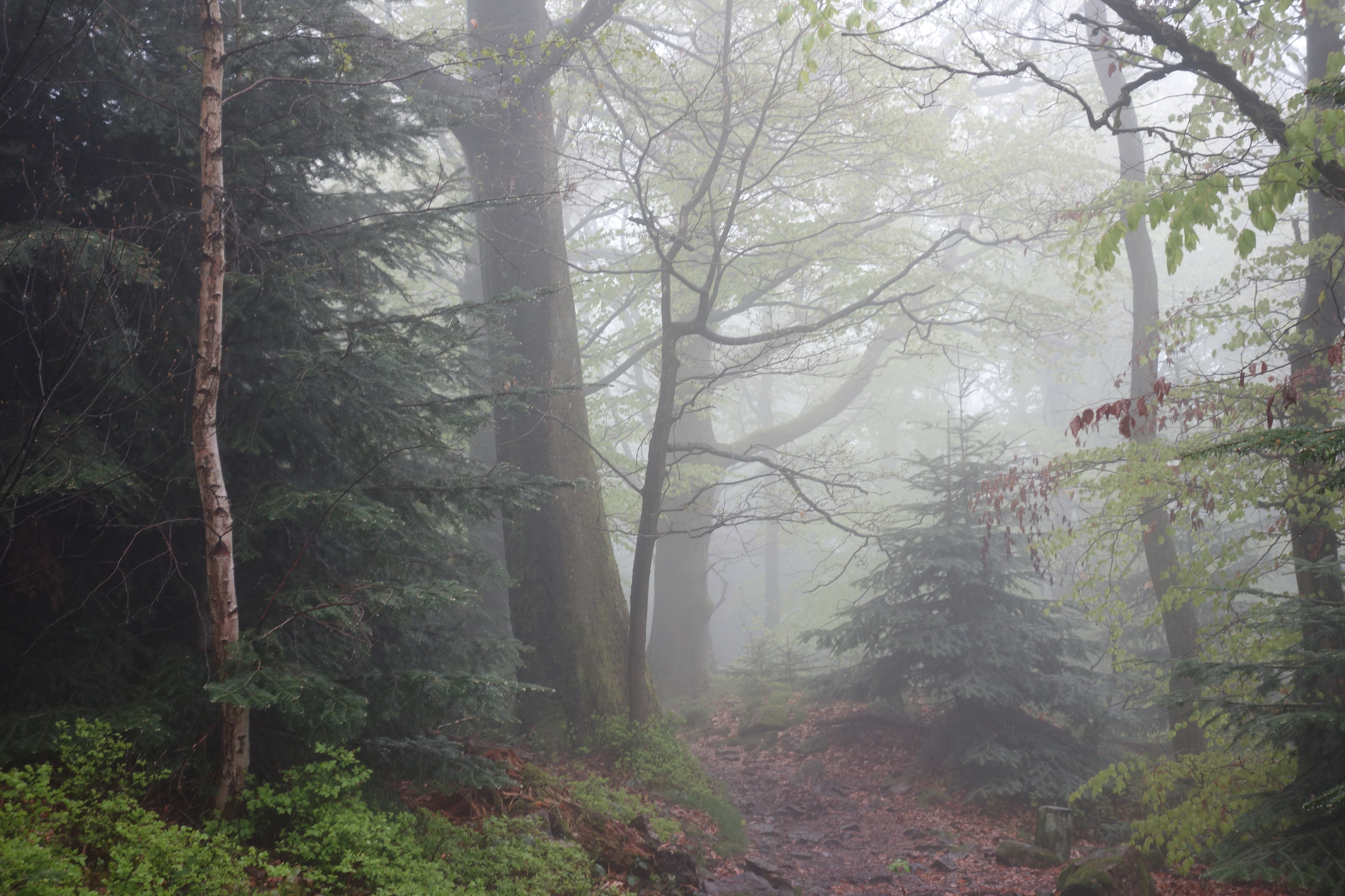 Naturschutzgebiet Battertfelsen Bannwald, Baden-Baden, Baden-Württemberg